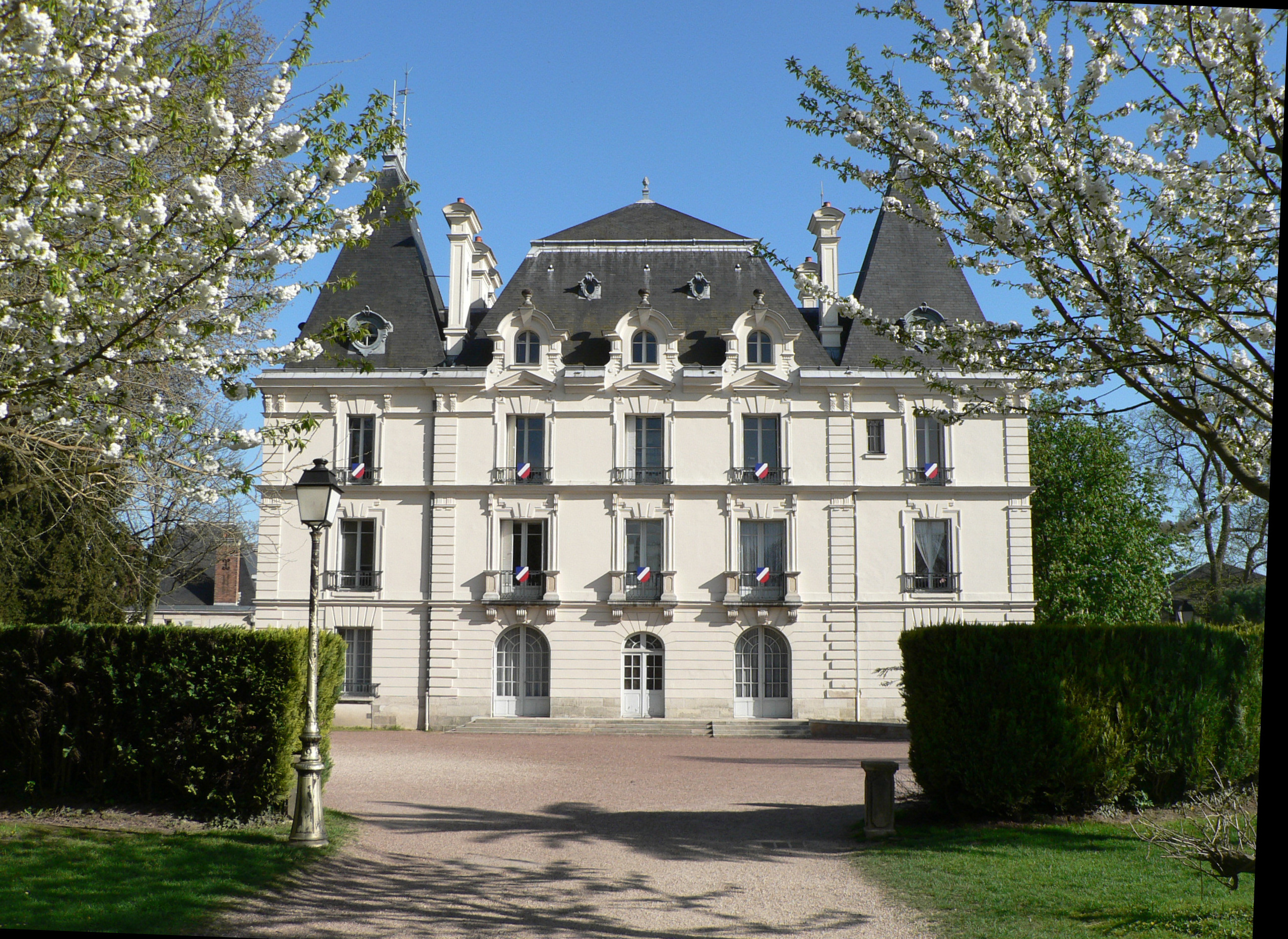 Hôtel de ville de Chilly-Mazarin.